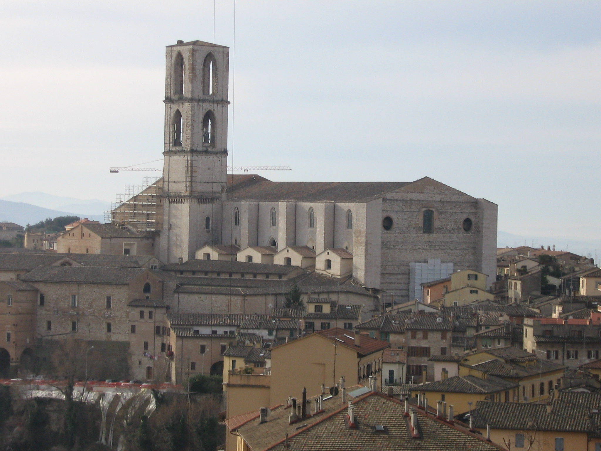 Basilica di San Domenico a Perugia.